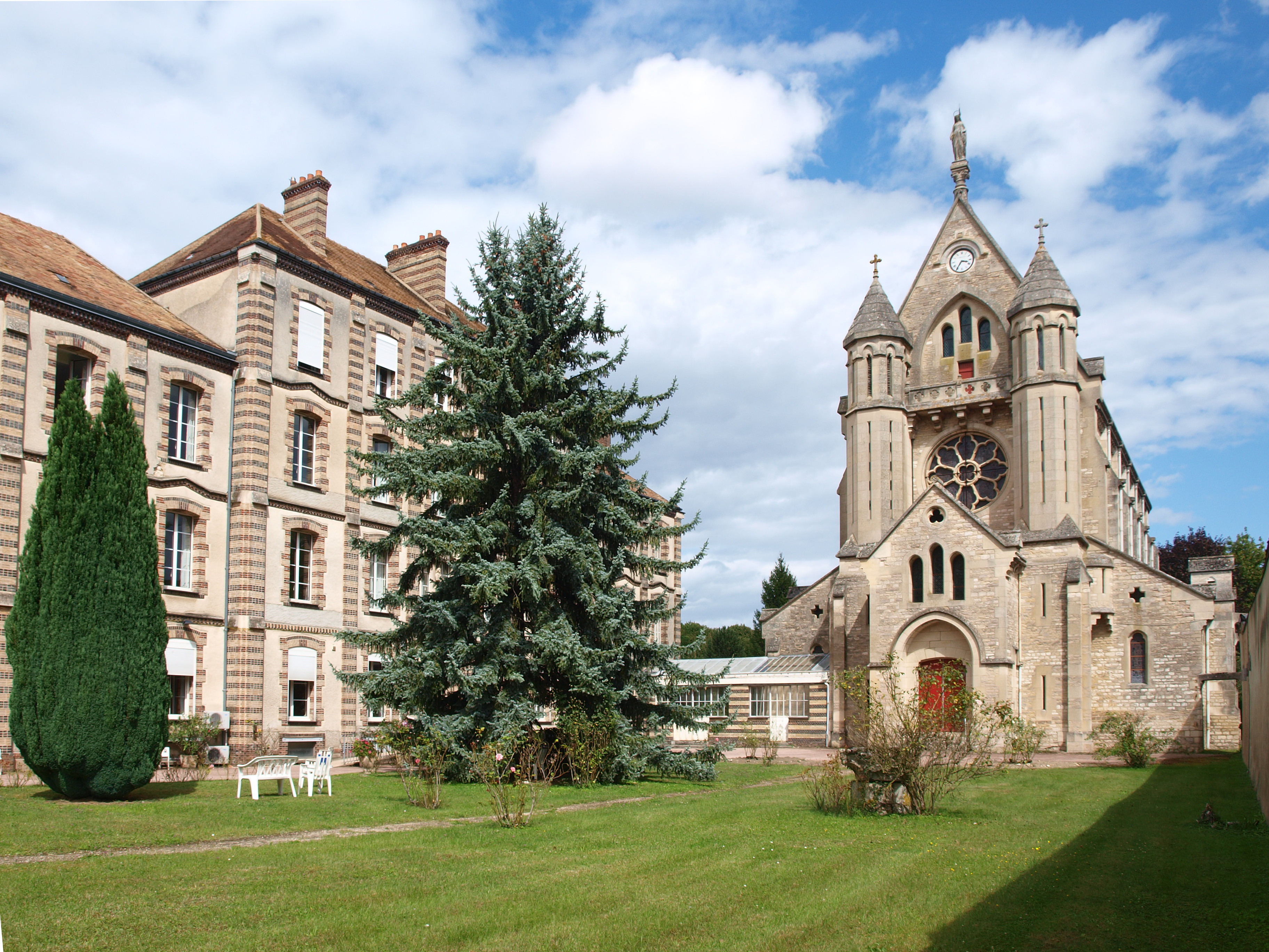 L'Abbaye Sainte-Colombe de Saint-Denis-lès-Sens (Yonne, Bourgogne-Franche-Comté, France) avec à gauche le monastère reconverti en centre de convalescence, à droite la chapelle et au premier plan devant la chapelle les vestiges de l'ancien monastère datant du Haut Moyen Âge.